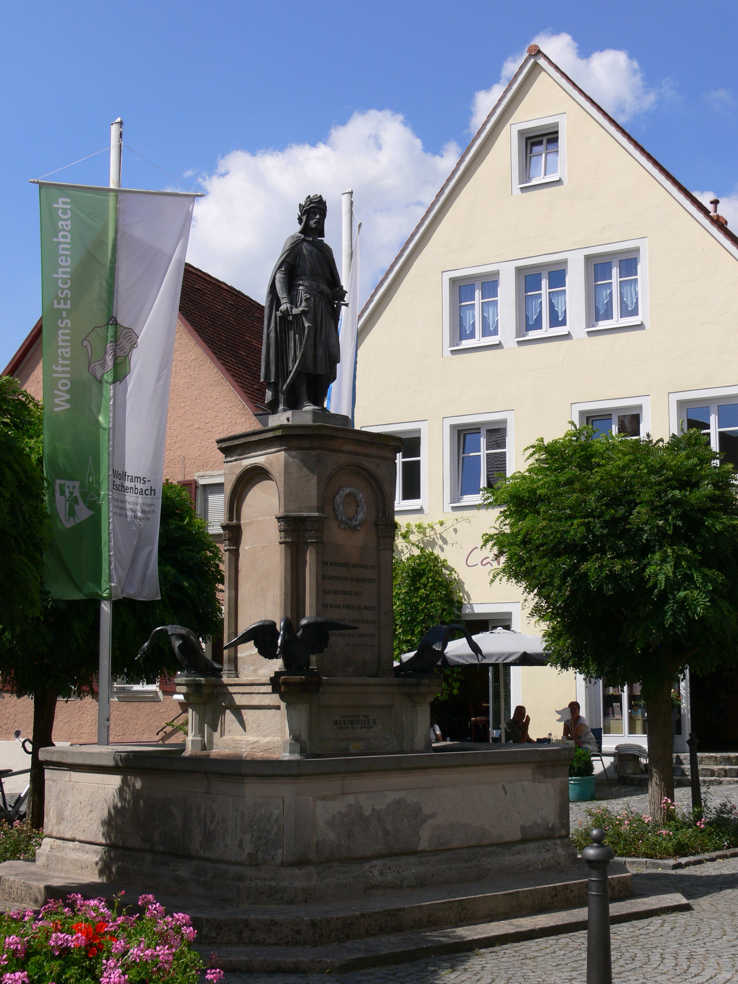 Wolframs-Eschenbach, Landkreis Ansbach Wolfram-von-Eschenbach-Denkmal